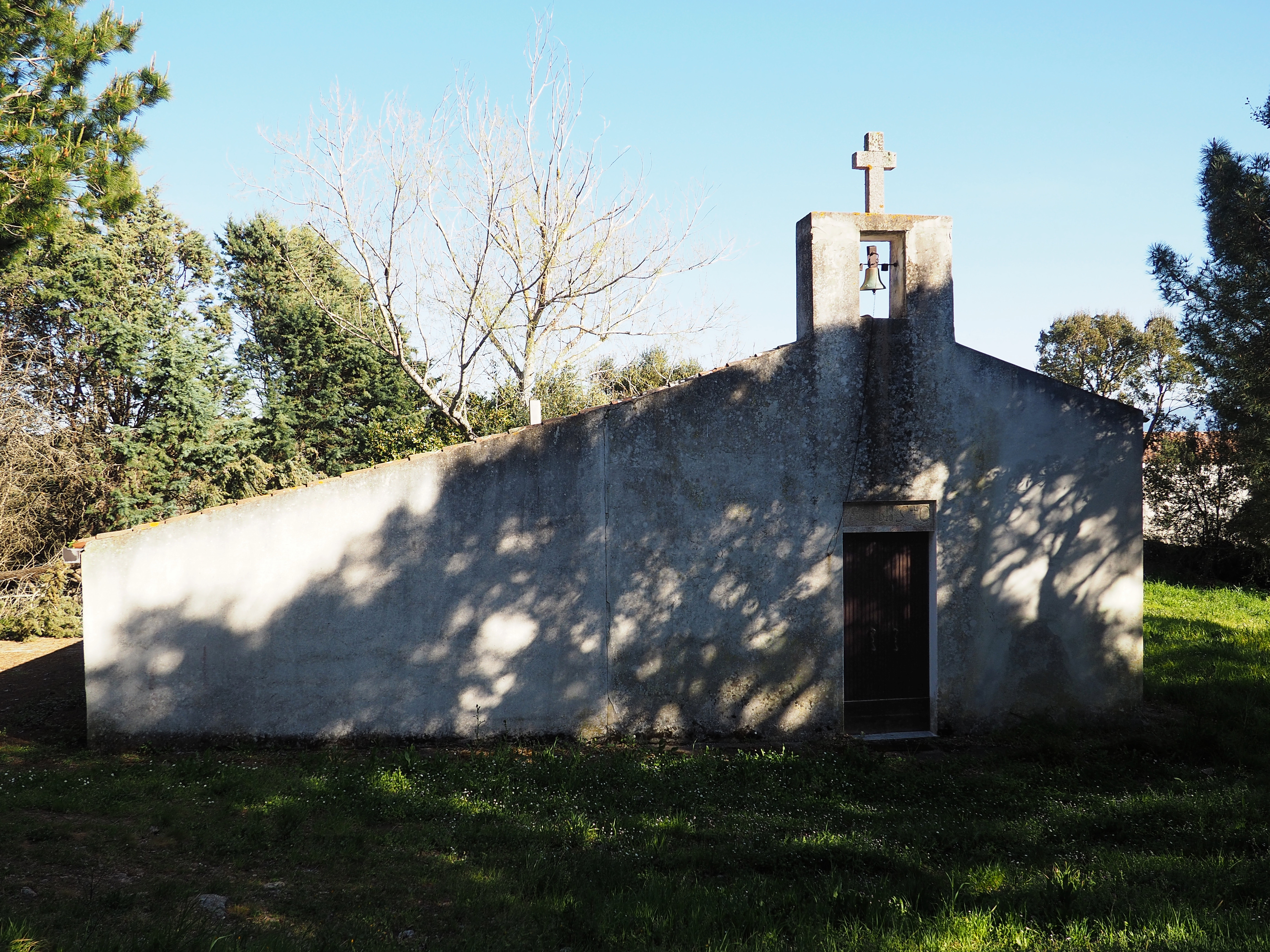 Chiesa campestre di San Gavino, Proto e Gianuario a Tempio Pausania